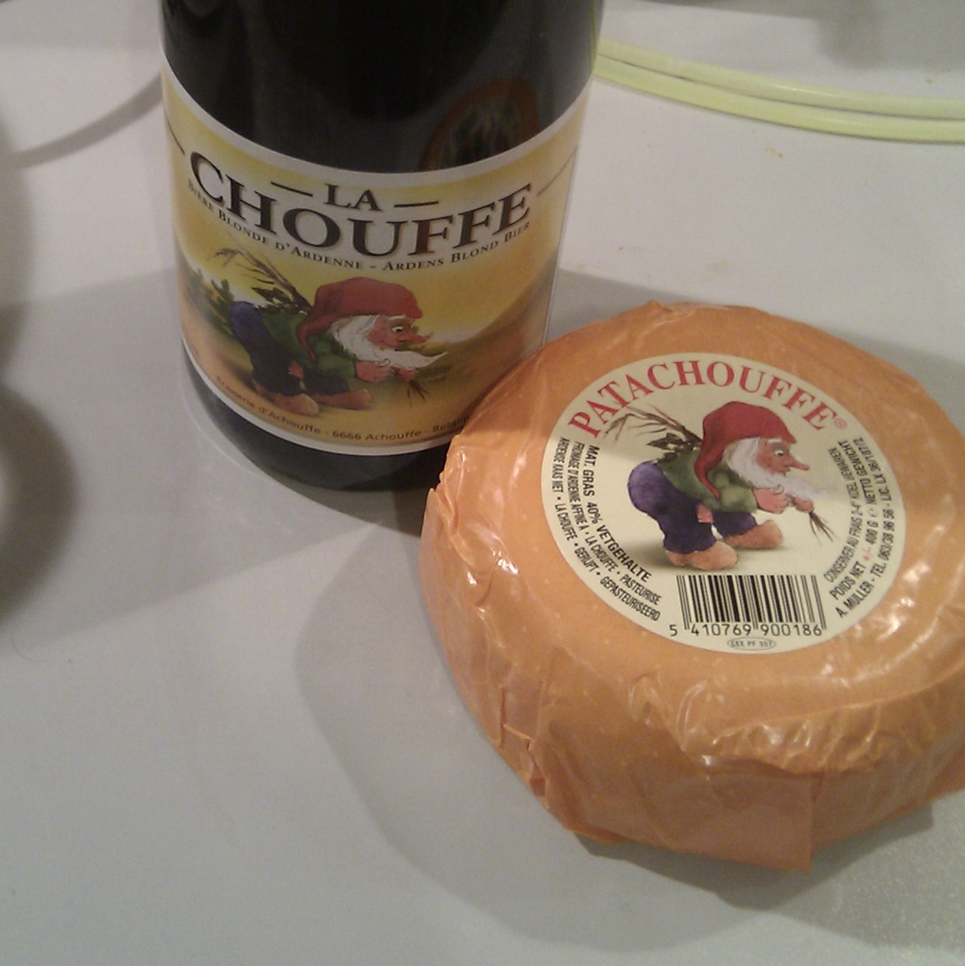 Le fromage Patachouffe avec la bouteille de bière Chouffe